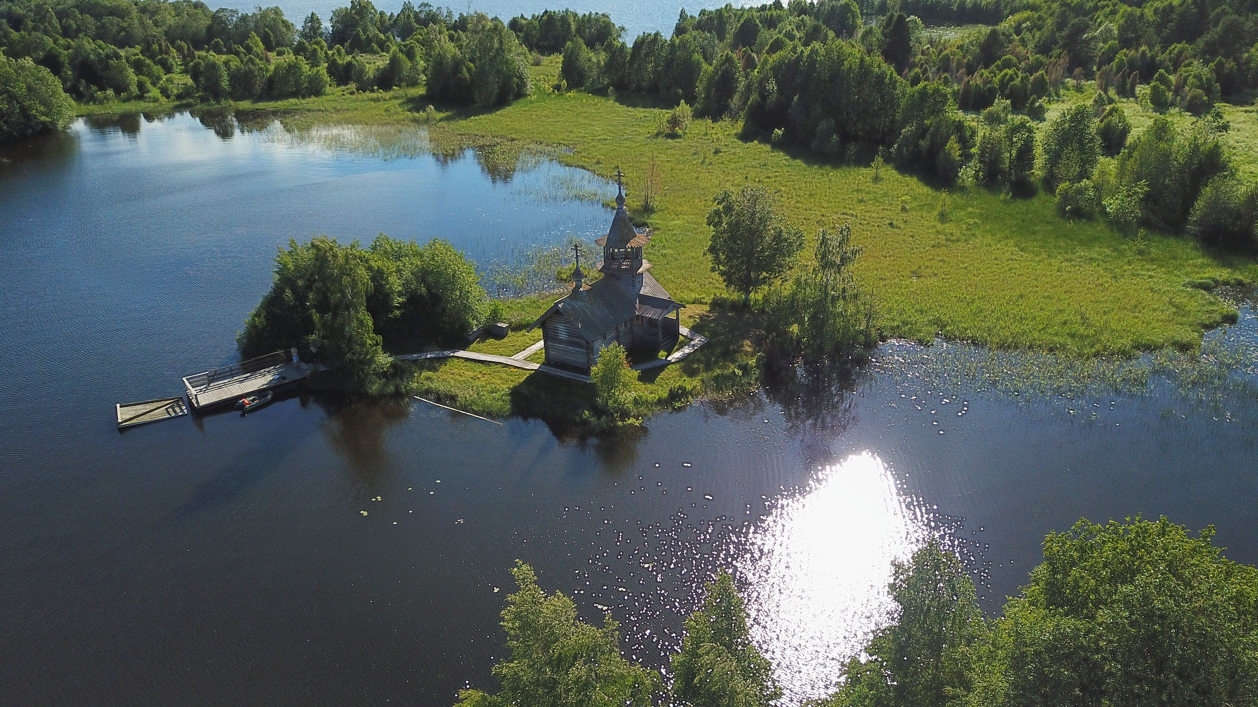 Еглово. Часовня иконы Божией Матери "Всех скорбящих Радость"